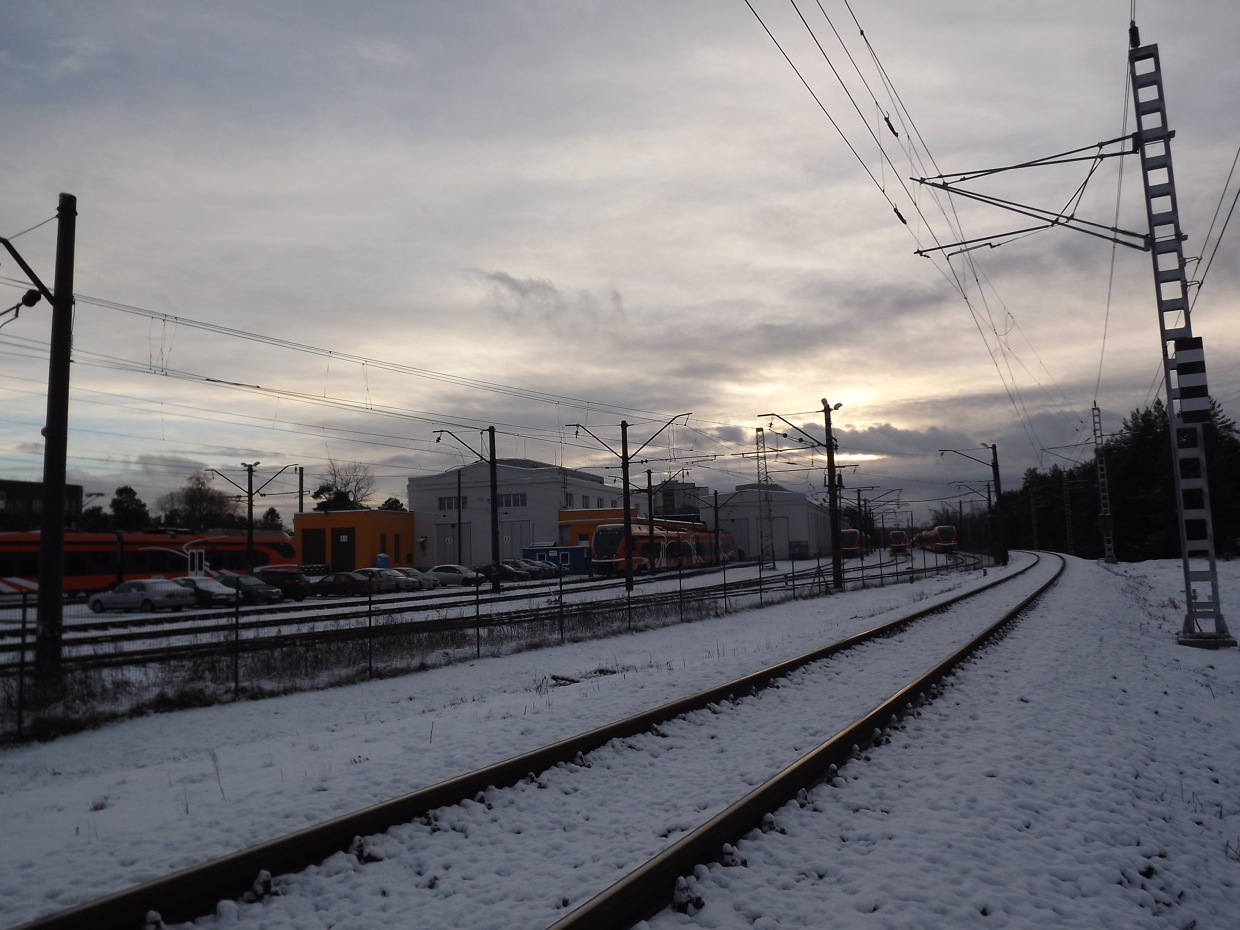 Pääsküla depoo